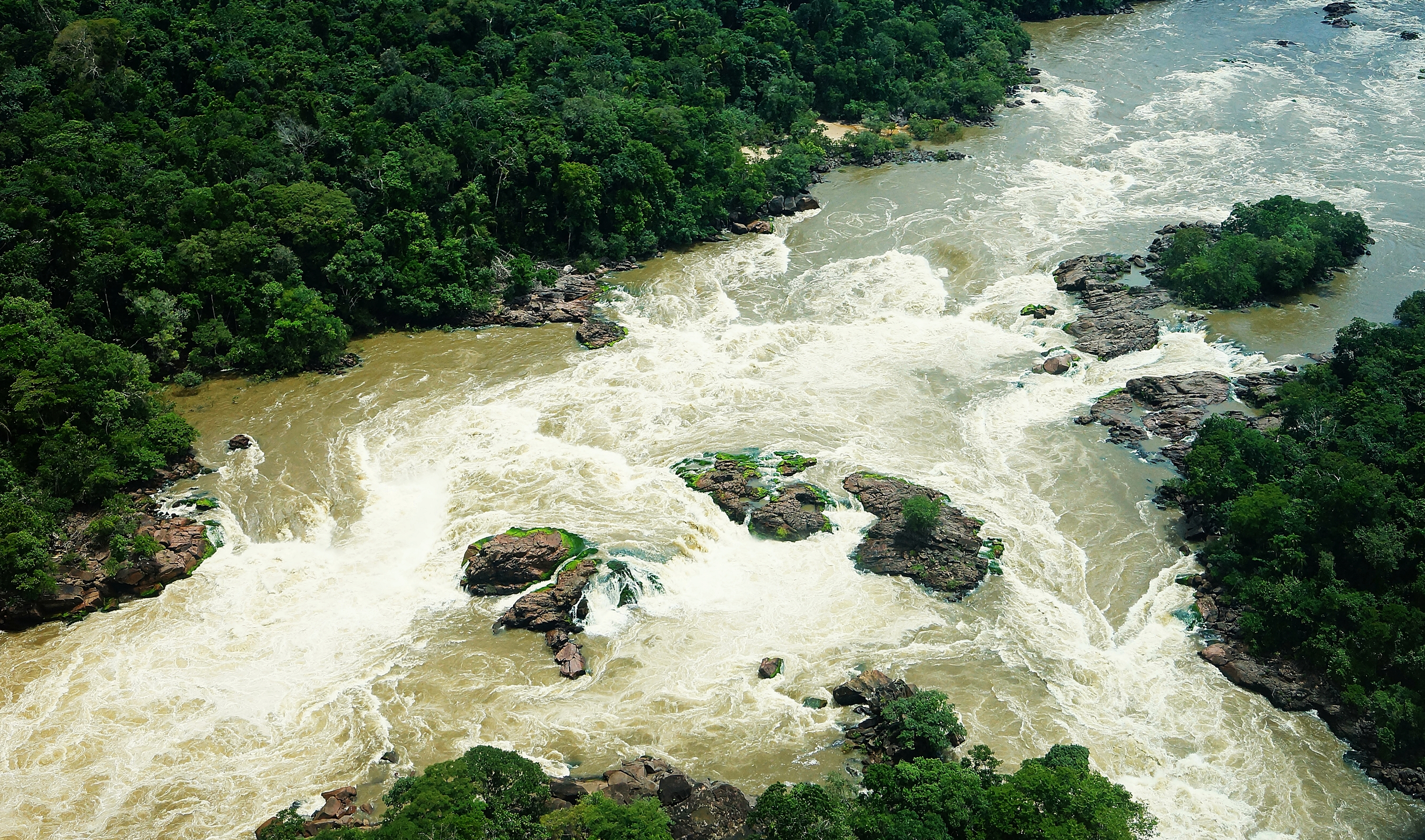 Região conhecida como 7 quedas situado no municipio de Paranaita -MT